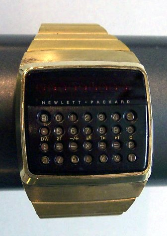 Hewlett Packard Digital Watch Modell 1 1977 mit integriertem Taschenrechner